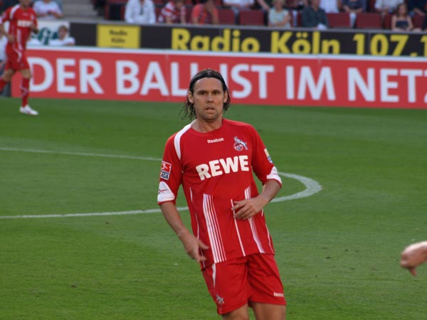 Maniche, 1. FC Köln 1-3 Vfl Wolfsburg, Köln August 08 2009